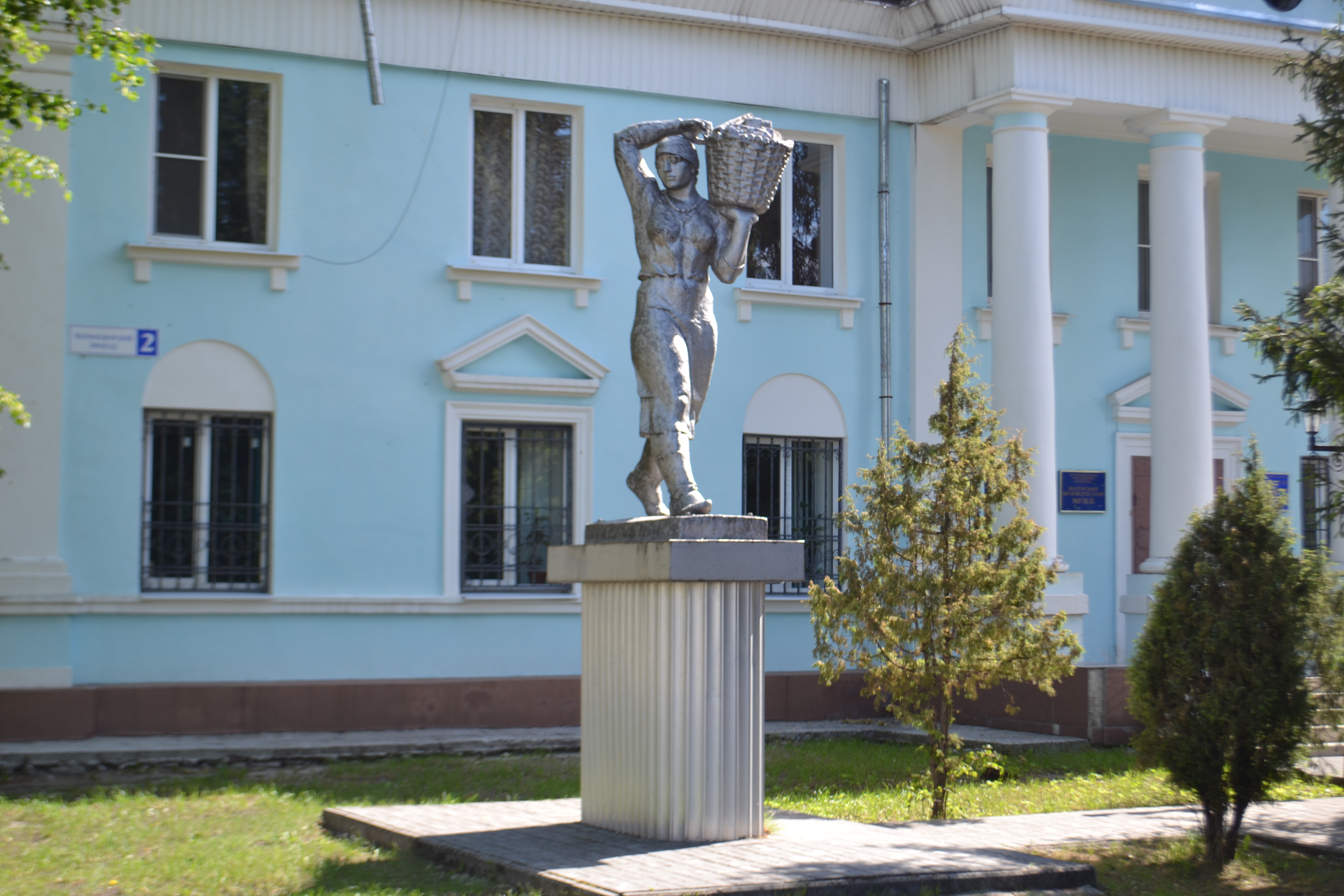 Памятник «Торфяница» (Шатура)